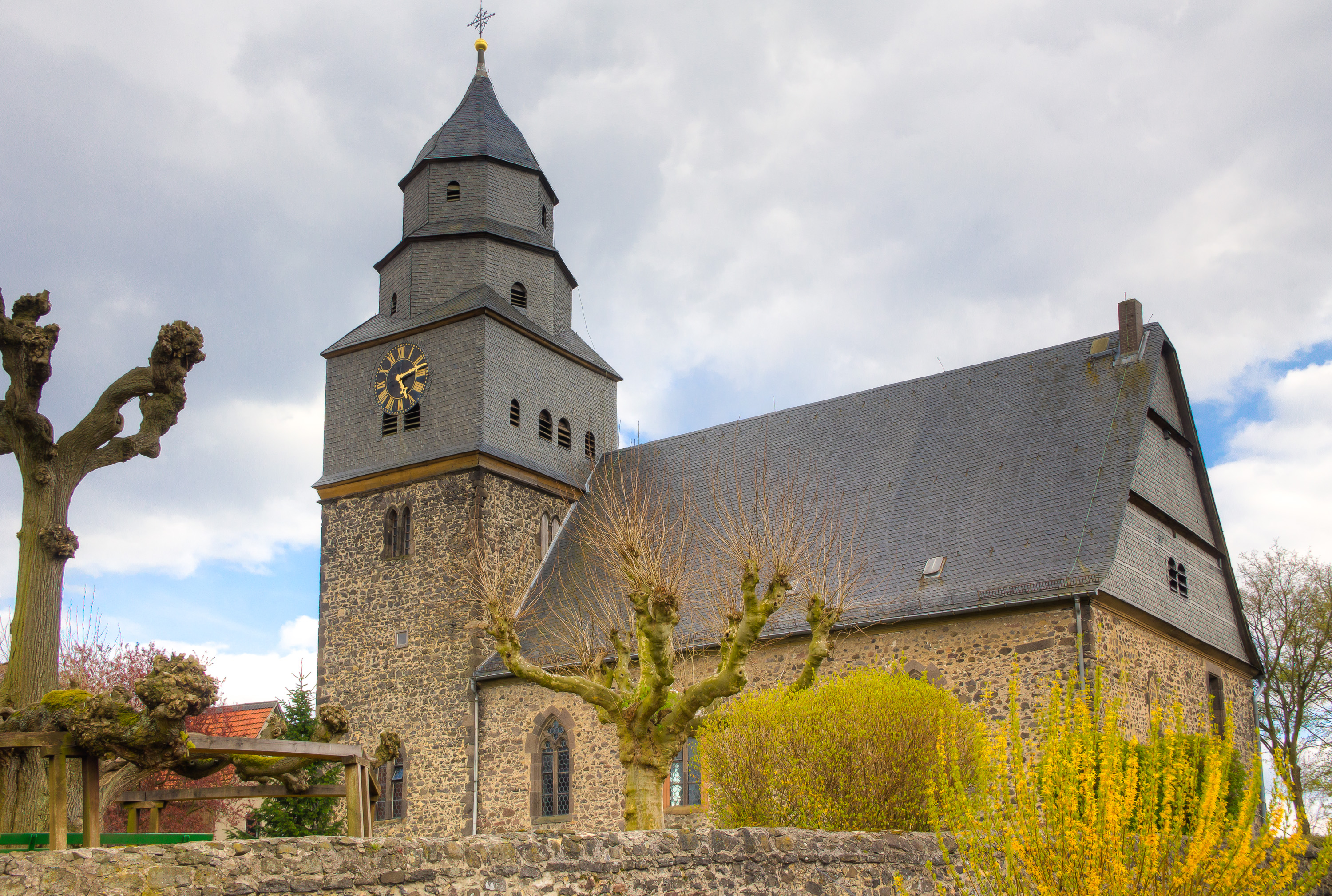 Evangelische Kirche Grüningen, Pohlheim, Landkreis Gießen in Hessen, Deutschland